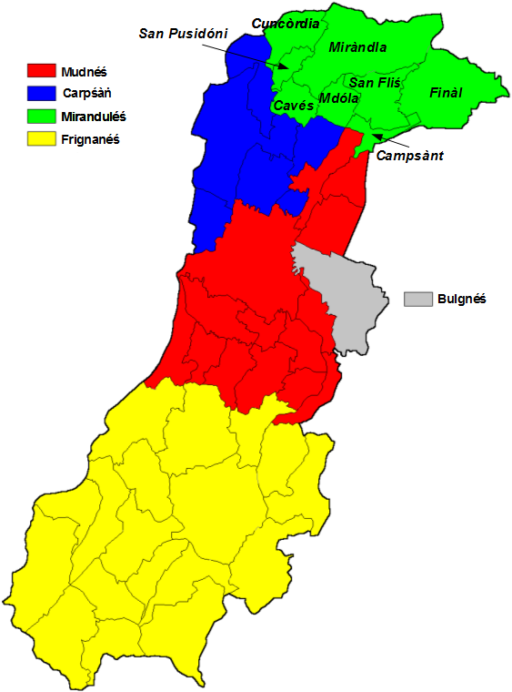 Emiliàn e rumagnòl: Dialét ch'i s dascóran in Pruvìnsa ad Mòdna. In élt, in vérd, quéi in du a dascór al Miranduléś